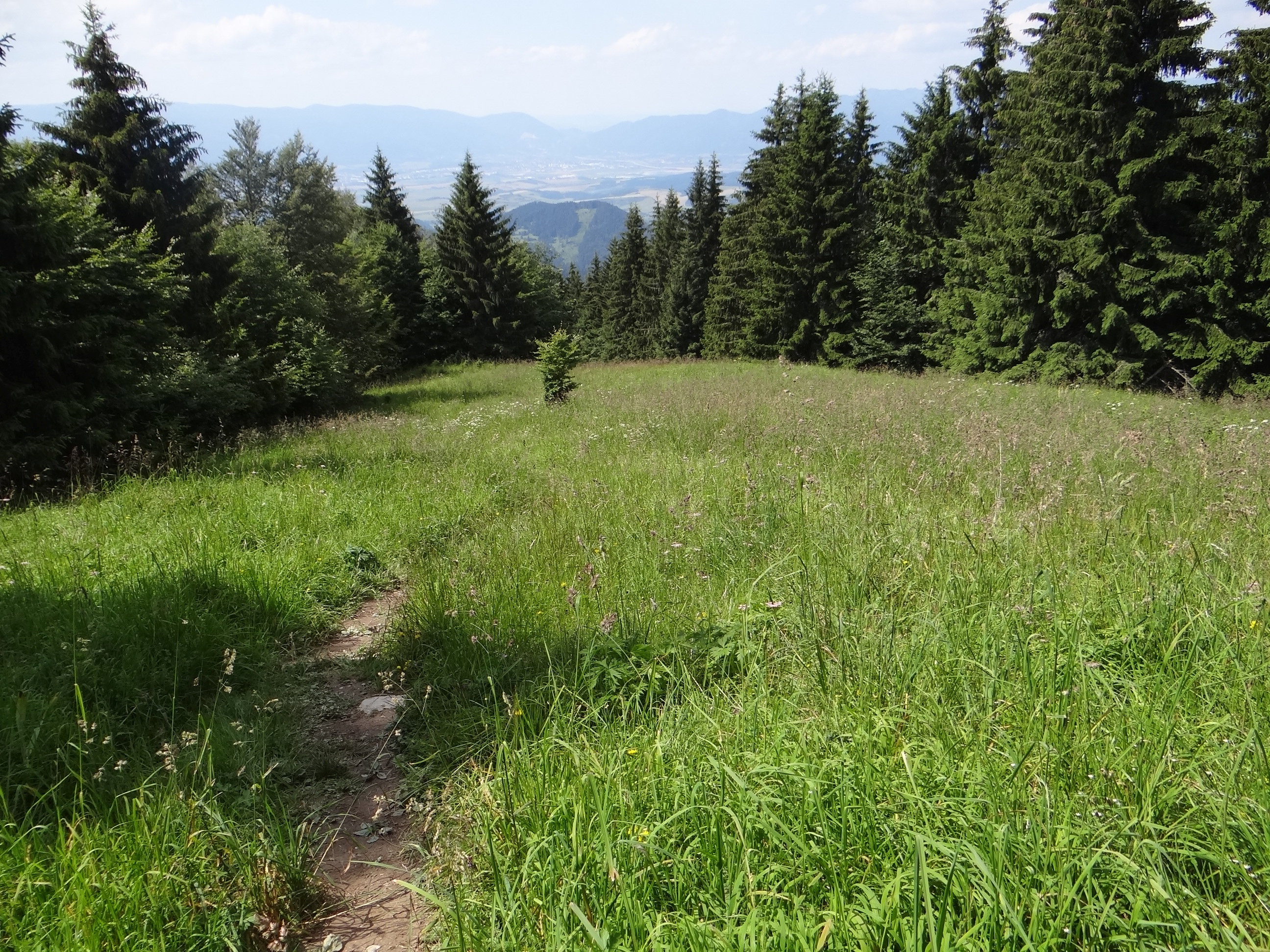 Lysec (Veľká Fatra)